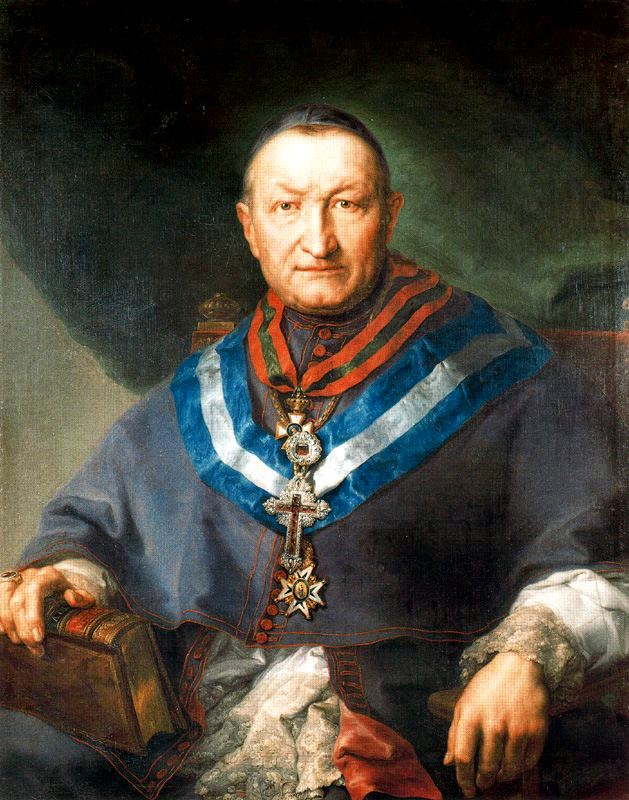 Retrato del eclesiástico español Gregorio Ceruelo de la Fuente (1755-1836), que fue obispo de Oviedo entre 1815 y 1836. Falleció el día 26 de marzo de 1836.